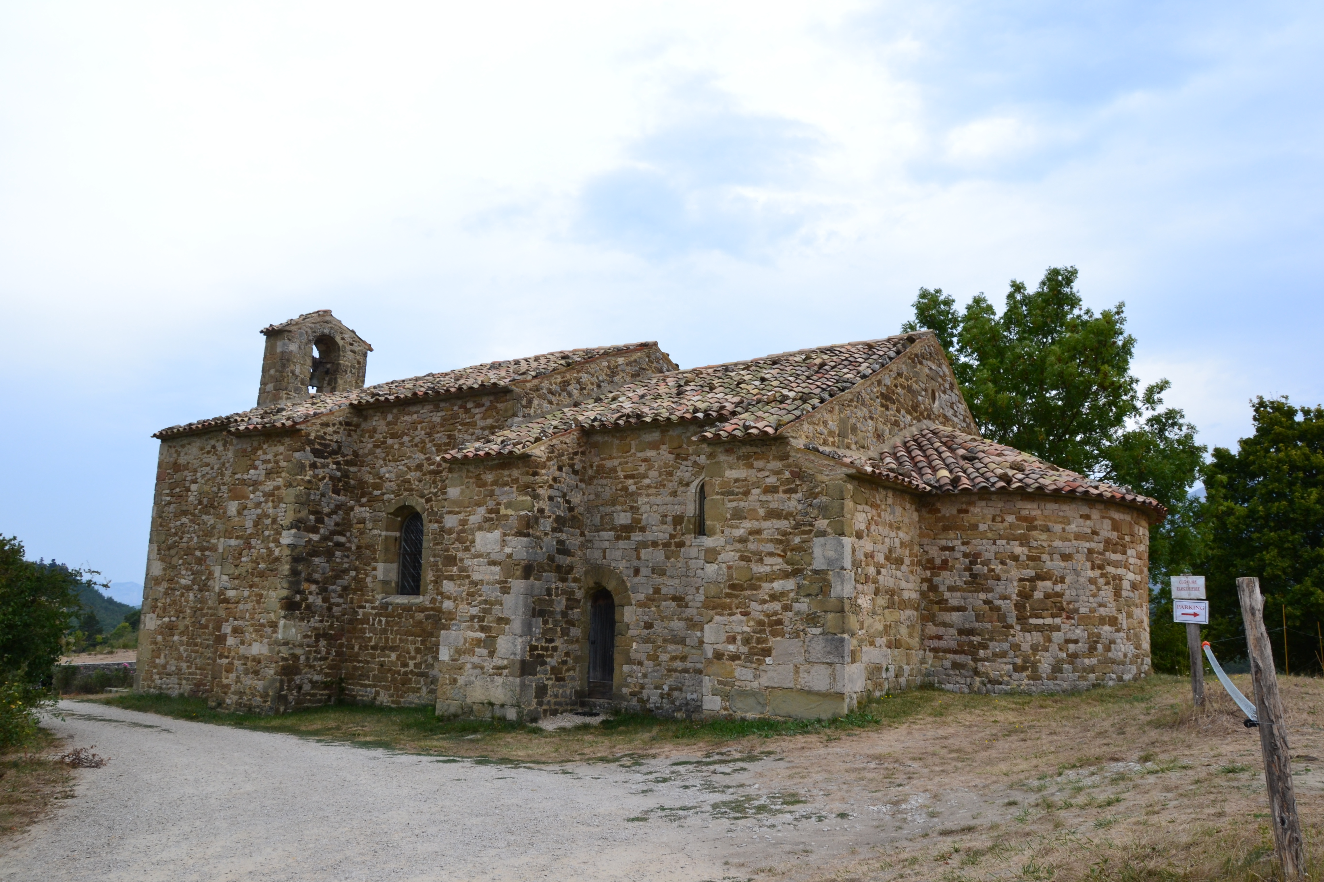 Chapelle Saint-Jean de Crupies